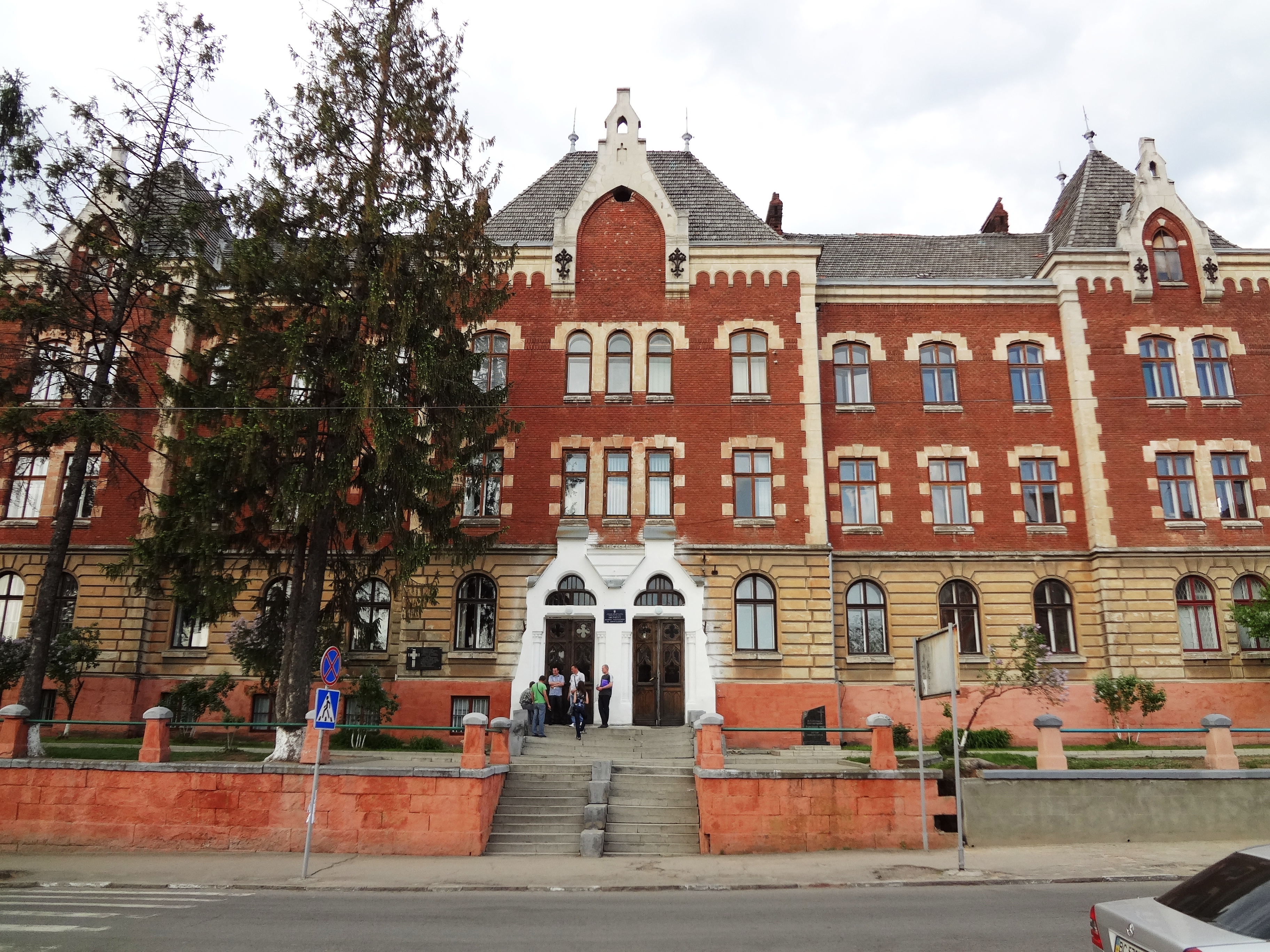 Адмінбудинок, Дрогобич, вул. Стрийська, 3